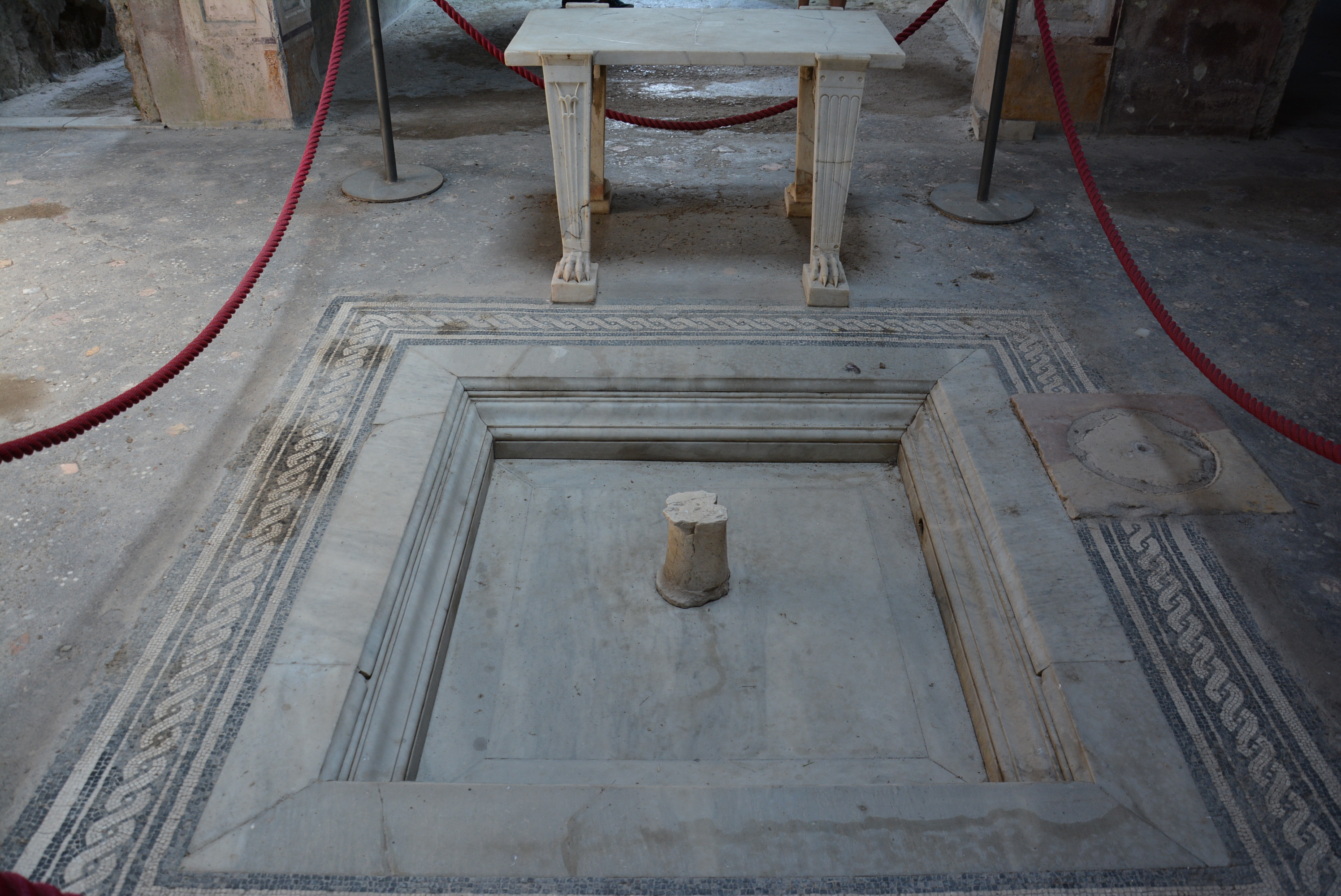 Casa di Marco Lucrezio Frontone - MIBACT This is a photo of a monument which is part of cultural heritage of Italy.